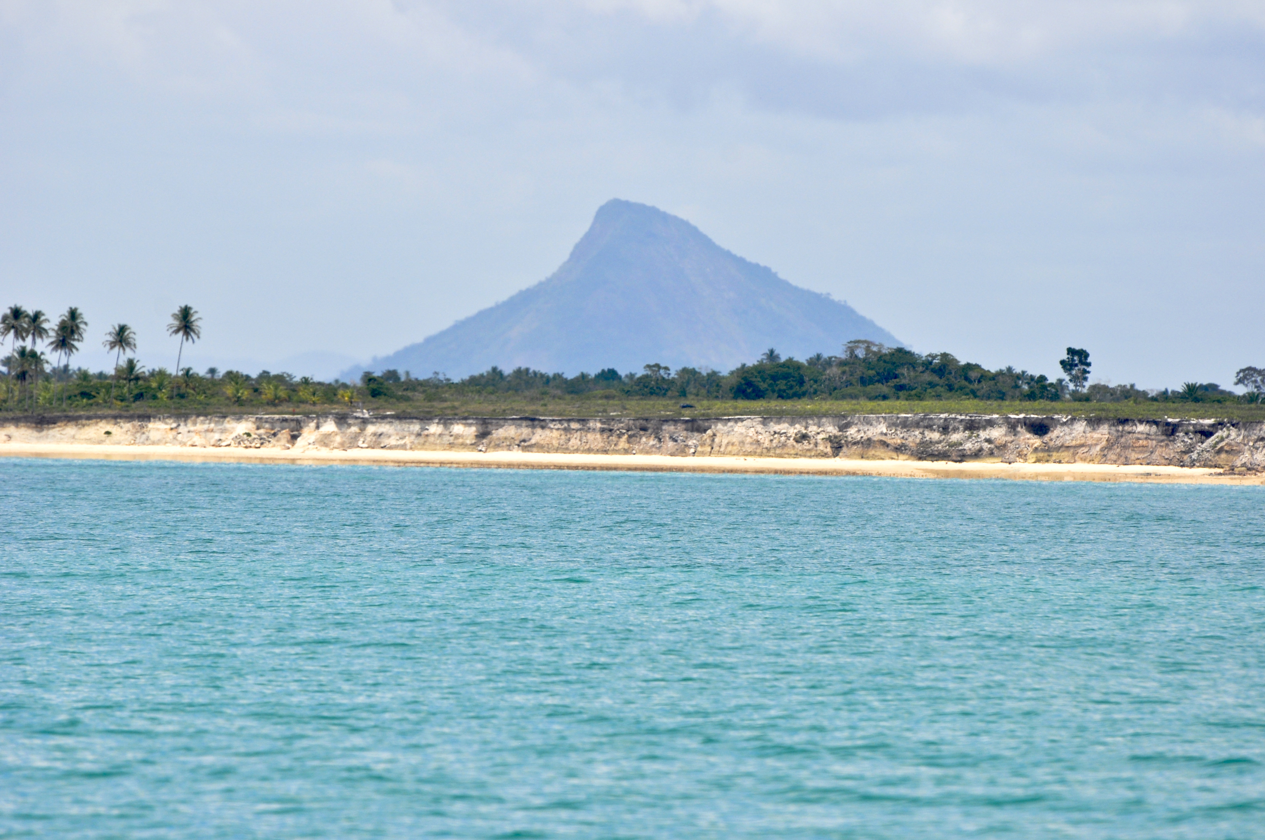 Vista sobre o mar.